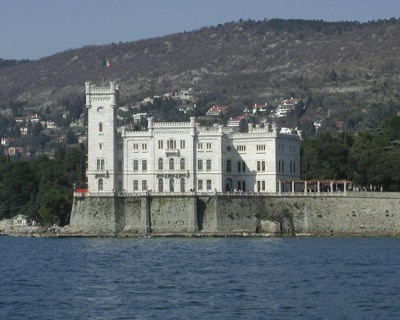 Castello di Miramare, Triest